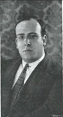 Fernando de la Milla Alonso de la Florida (Jerez, España, 14 de febrero de 1895 – Estados Unidos de América, C. 1961) fue un Periodista, escritor, autor teatral y traductor.